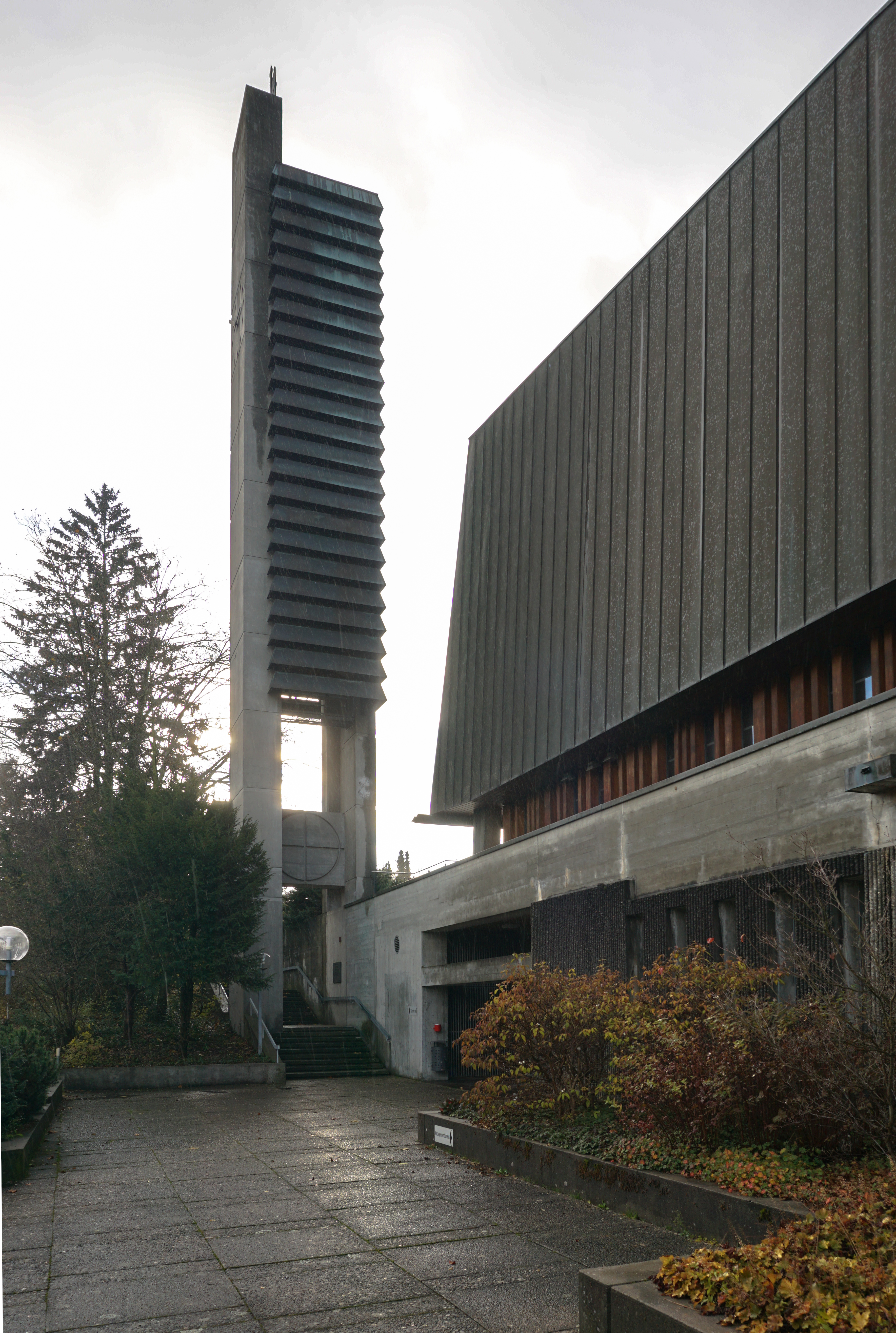 Thomaskirche Südseite mit Turm